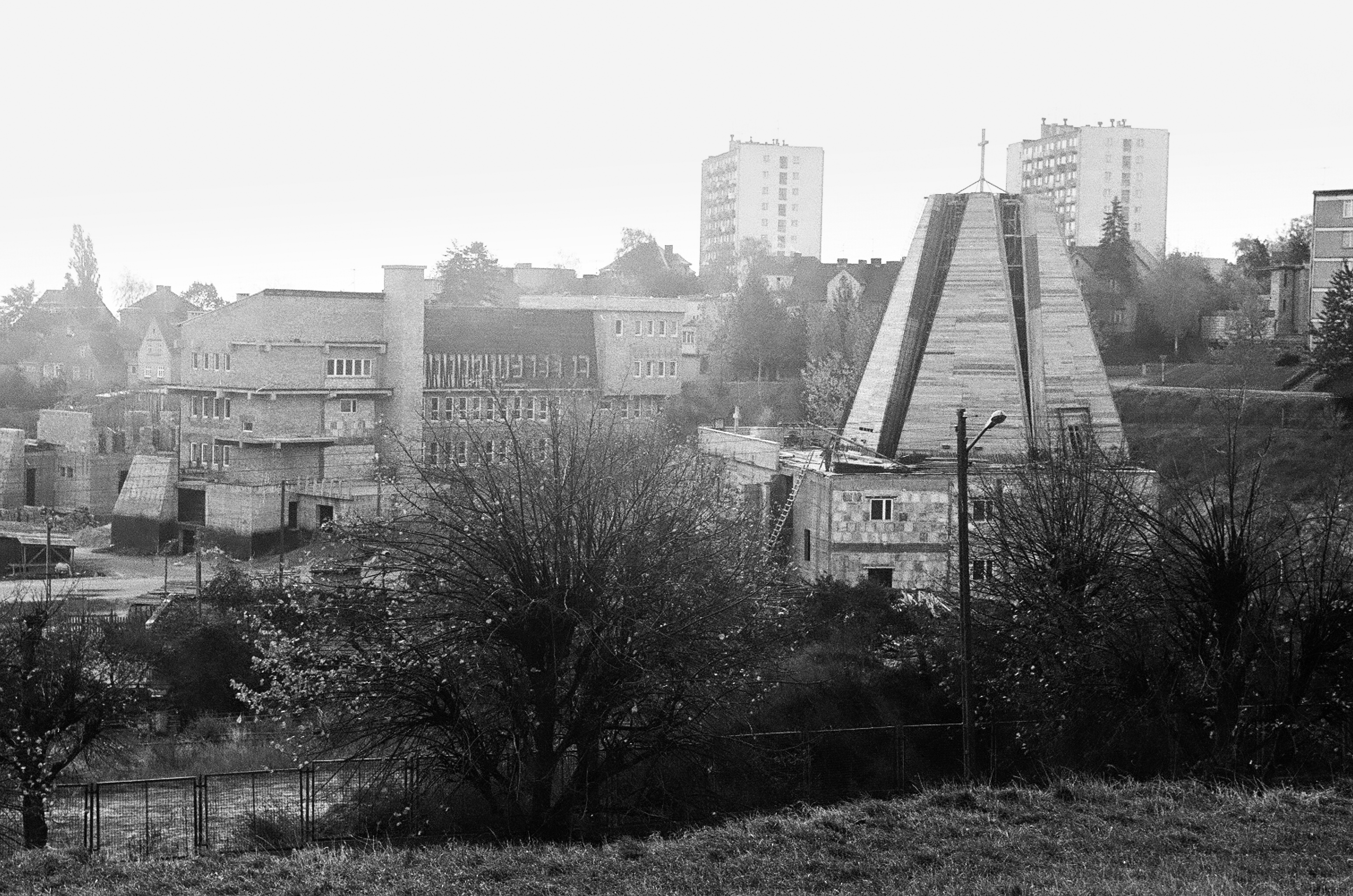 Gorzów Wlkp. Parafia Najświętszej Maryi Panny Królowej Polski, ul. Żeromskiego 22 - 1984 r.